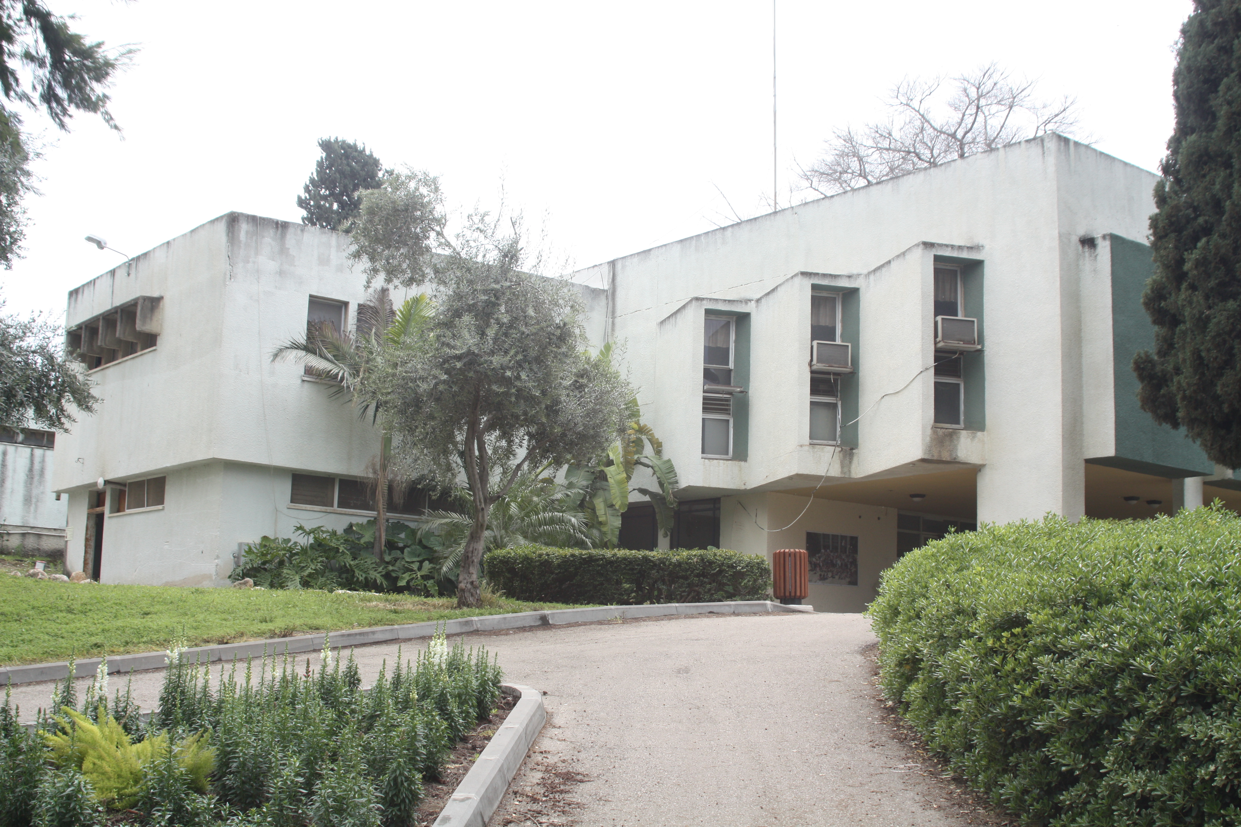 חדר האוכל של מצר Metzer dining room